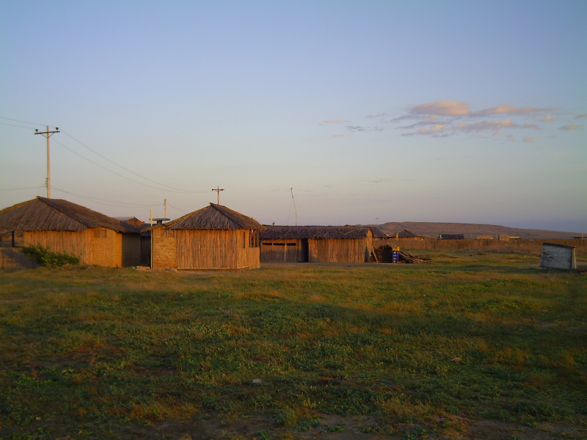 Foto de una ranchería Wayúu en el Cabo de la Vela (Colombia). aproximadamente a las 7:00 de la mañana con una camara Genius DV611.